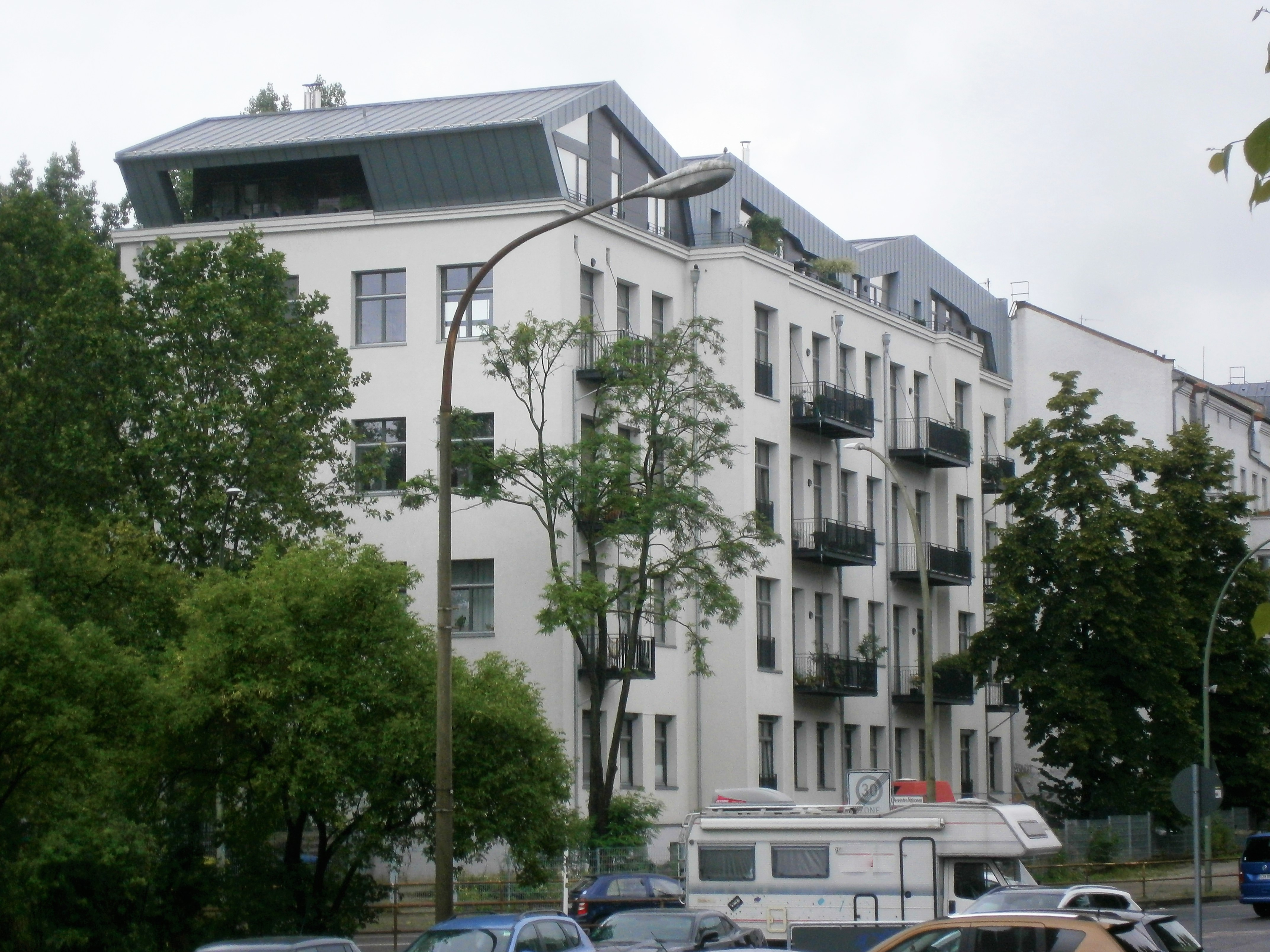 Die Friedenstraße ist eine Straße im Berliner Bezirk Friedrichshain-Kreuzberg, Ortsteil Friedrichshain. Angelegt und benannt wurde sie 1871-1876 auf dem Communicationsweg außerhalb der abgerissenen Berliner Zollmauer. Bereits seit dem Anlegen und der Bebauung bestand eine Teilung der Straße auf Königstadt und Stralauer Viertel. Aktuell sind es drei unterschiedene Straßenabschnitte: regionale Straßenverbindung im Barnimkiez am Volkspark Friedrichshain, am Platz der Vereinten Nationen als Parkzone, südlich im (Planungsraum) "Friedenstraße" als Ergänzungsstraße. Im Bild das 2017 neu errichtete Wohnhaus Friedenstraße 16/17 auf dem Grundstück der abgerissenen 1950er Schule.